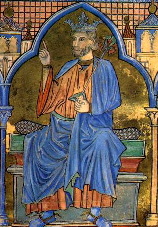 El rey Fernando III de Castilla, representado en el Tumbo A o Índice de los Privilegios reales de Santiago de Compostela. Fernando III, apodado "el Santo", fue hijo del rey Alfonso IX de León y de la reina Berenguela I de Castilla. Durante su reinado se reunificaron definitivamente los reinos de León y Castilla y fueron conquistadas a los musulmanes las ciudades de Jaén, Córdoba, Sevilla y Murcia, entre otras. Falleció en 1252 y fue sucedido por su hijo, Alfonso X el Sabio. En 1671 fue canonizado por el Papa Clemente X y sus restos mortales, que se conservan incorruptos, se veneran en la catedral de Sevilla.